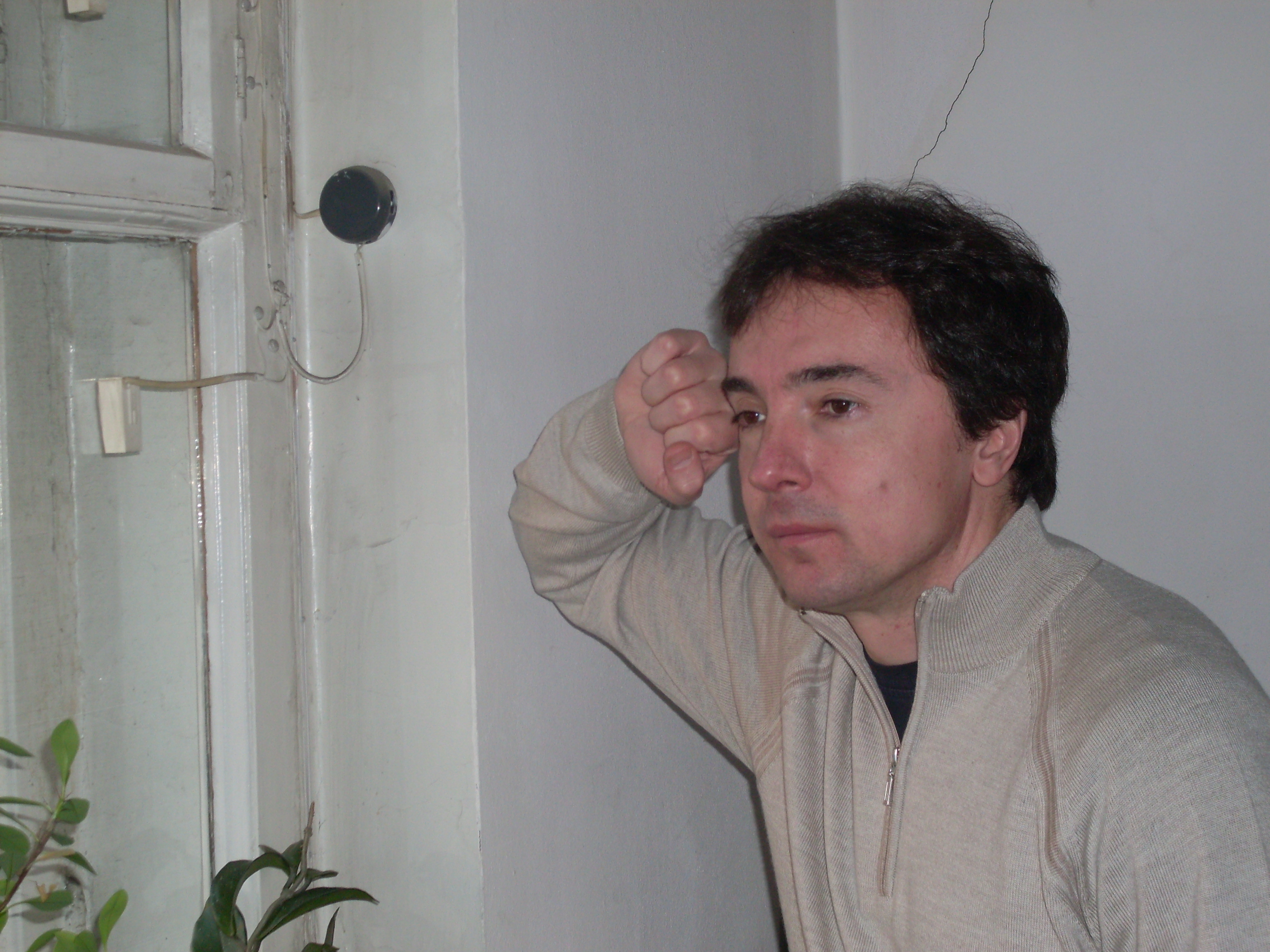 фото: Дударев Валерий Федорович